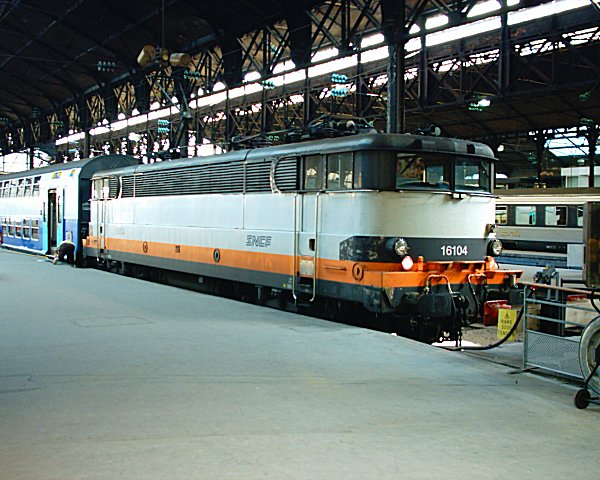 locomotive BB 16104 à Paris Saint Lazare en 2004.